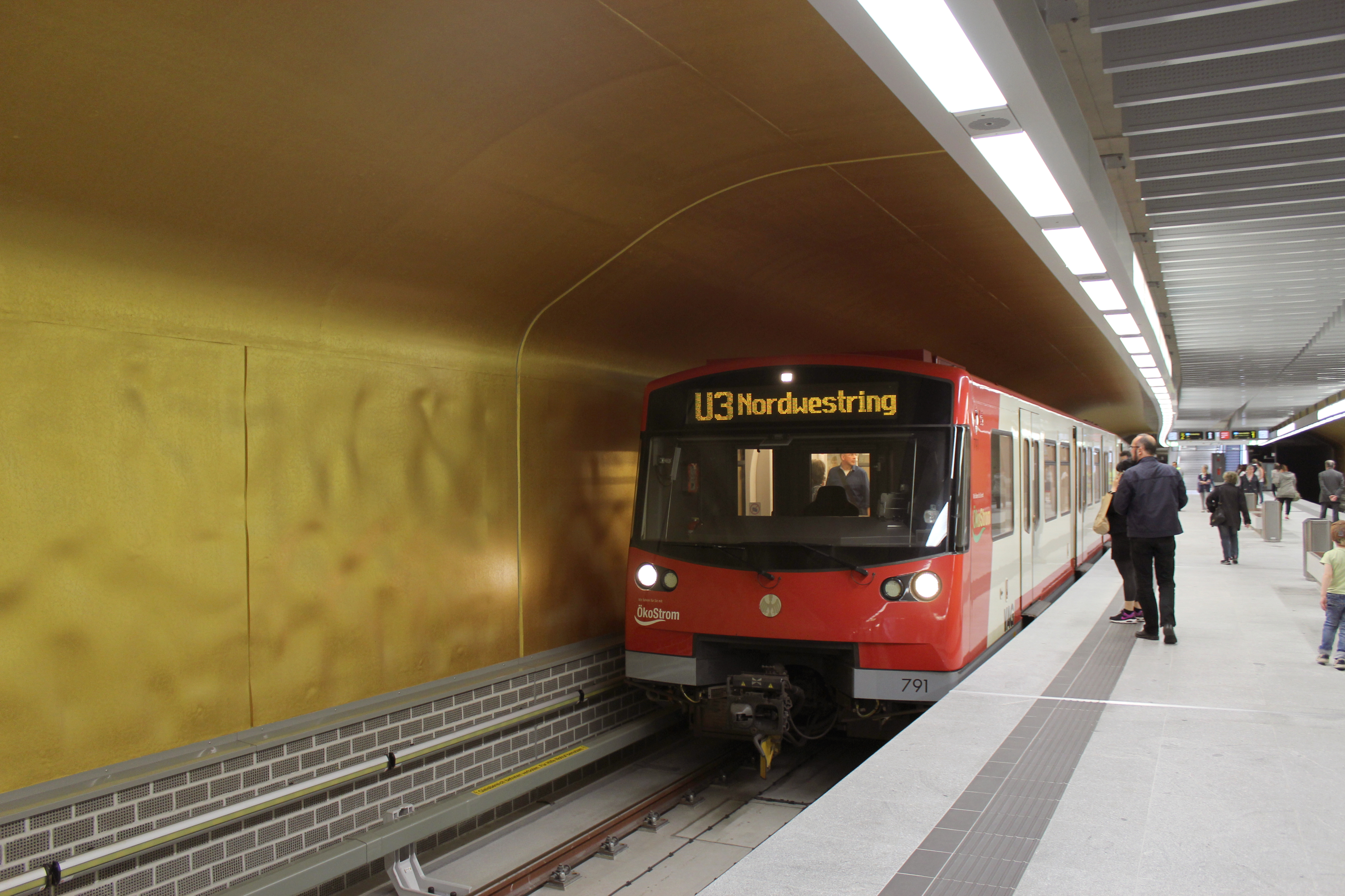 U-Bahn im U-Bahn-Bahnhof Klinikum Nord